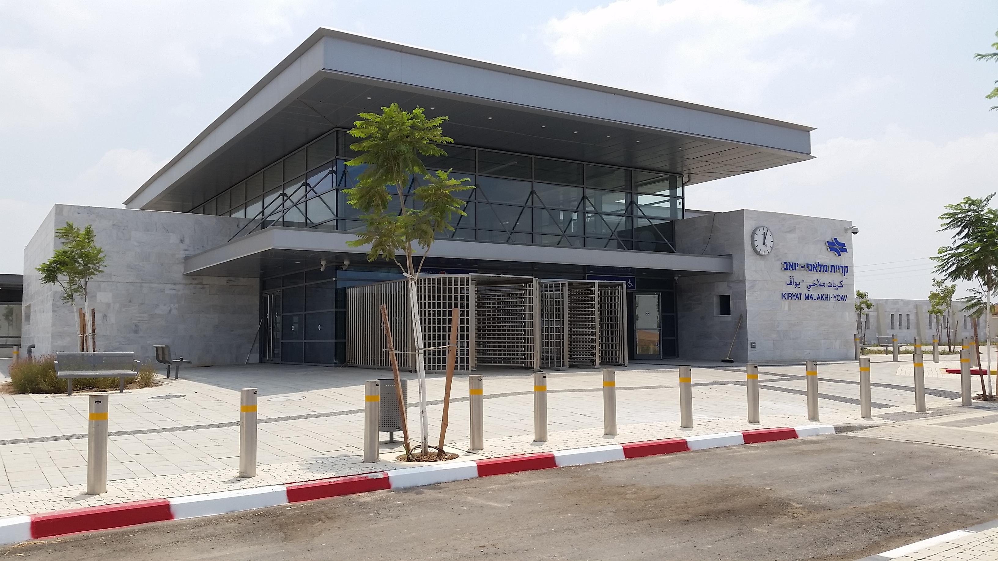 תמונת חזית תחנת רכבת מלאכי יואב